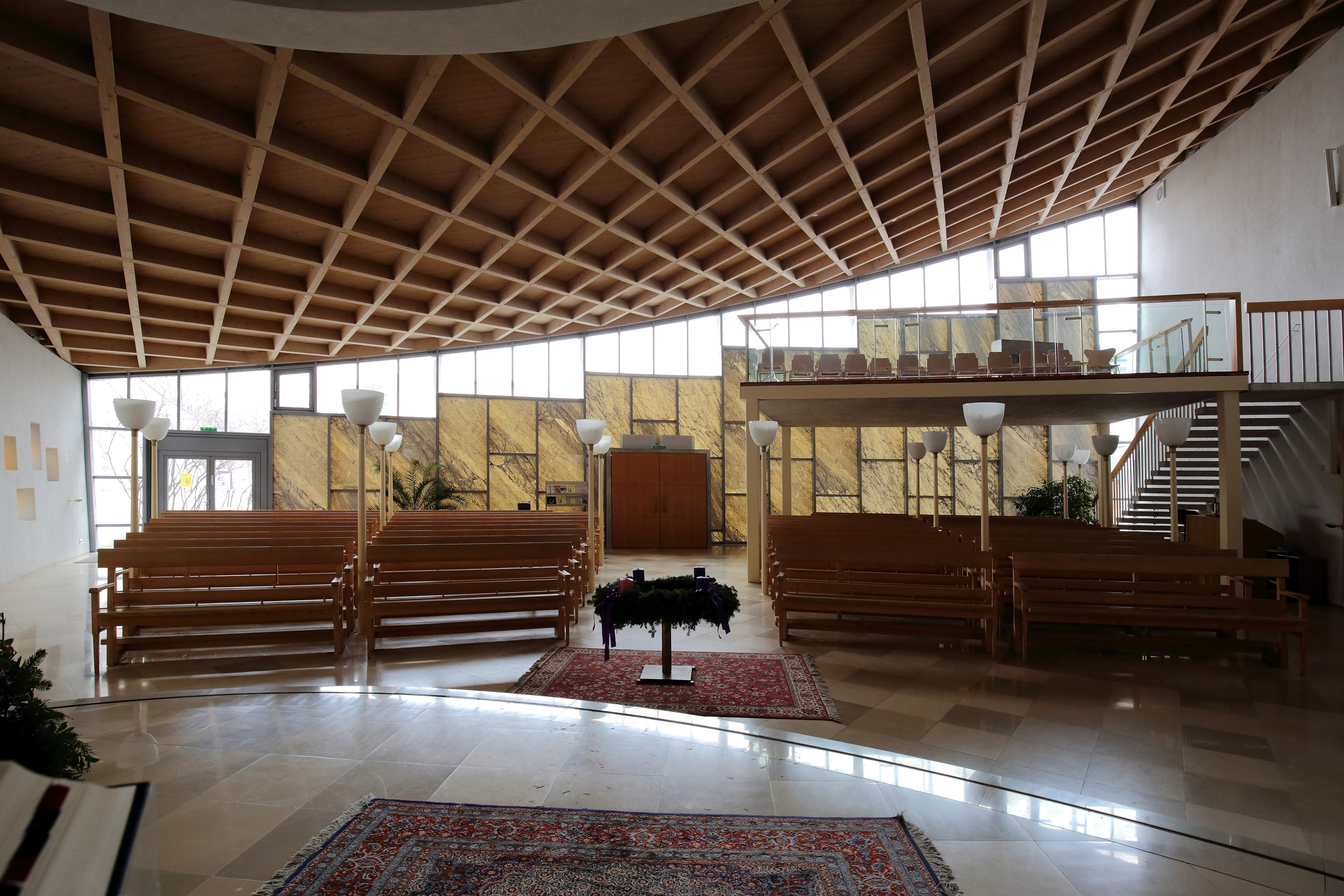 Blick vom Altarraum Richtung Kirchensaal in der Pfarrkirche St. Benedikt am Leberberg im 11. Wiener Gemeindebezirk Simmering.